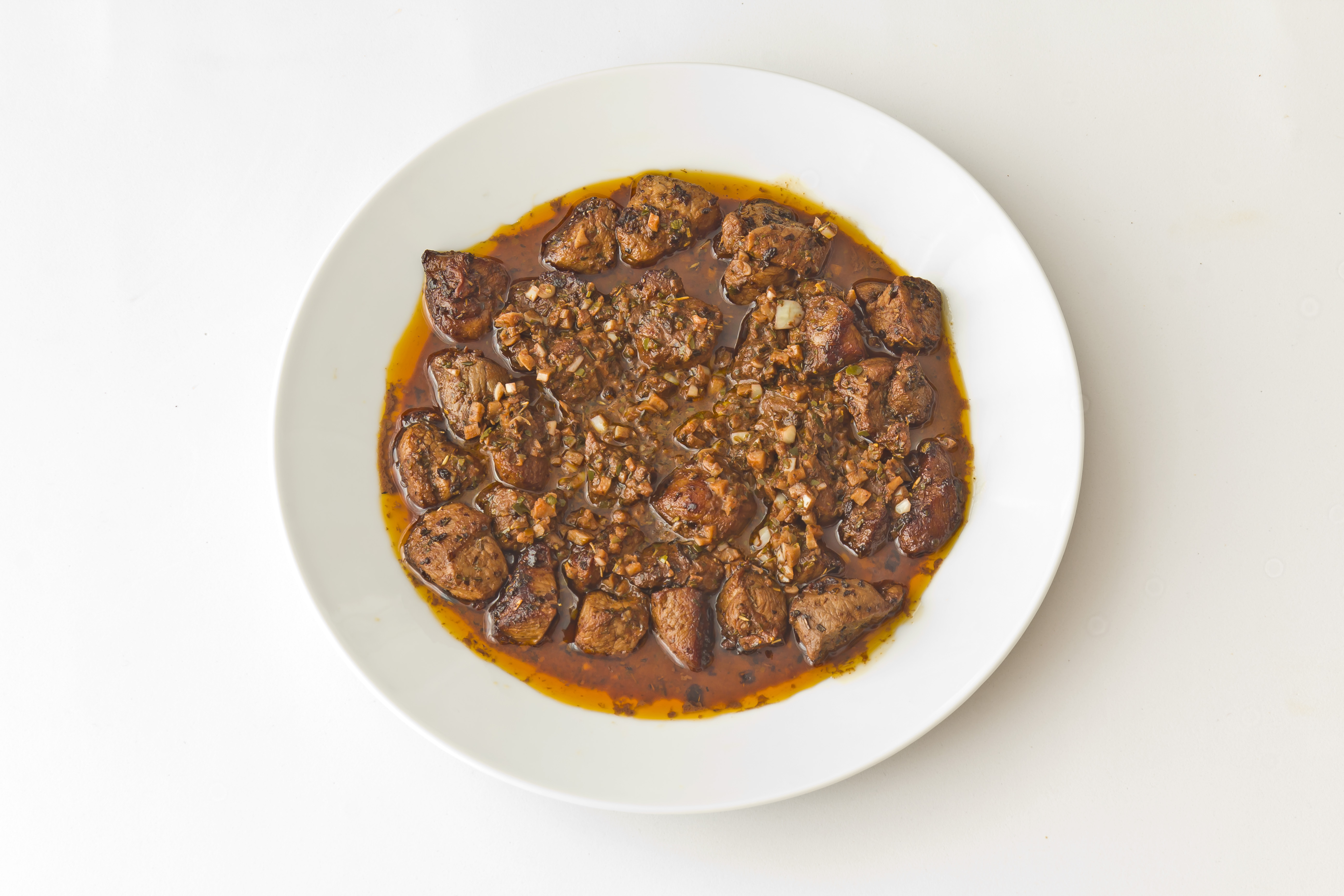 Carne Fiesta / Die Soße macht es! (Hommage an Grüne Tomaten!)